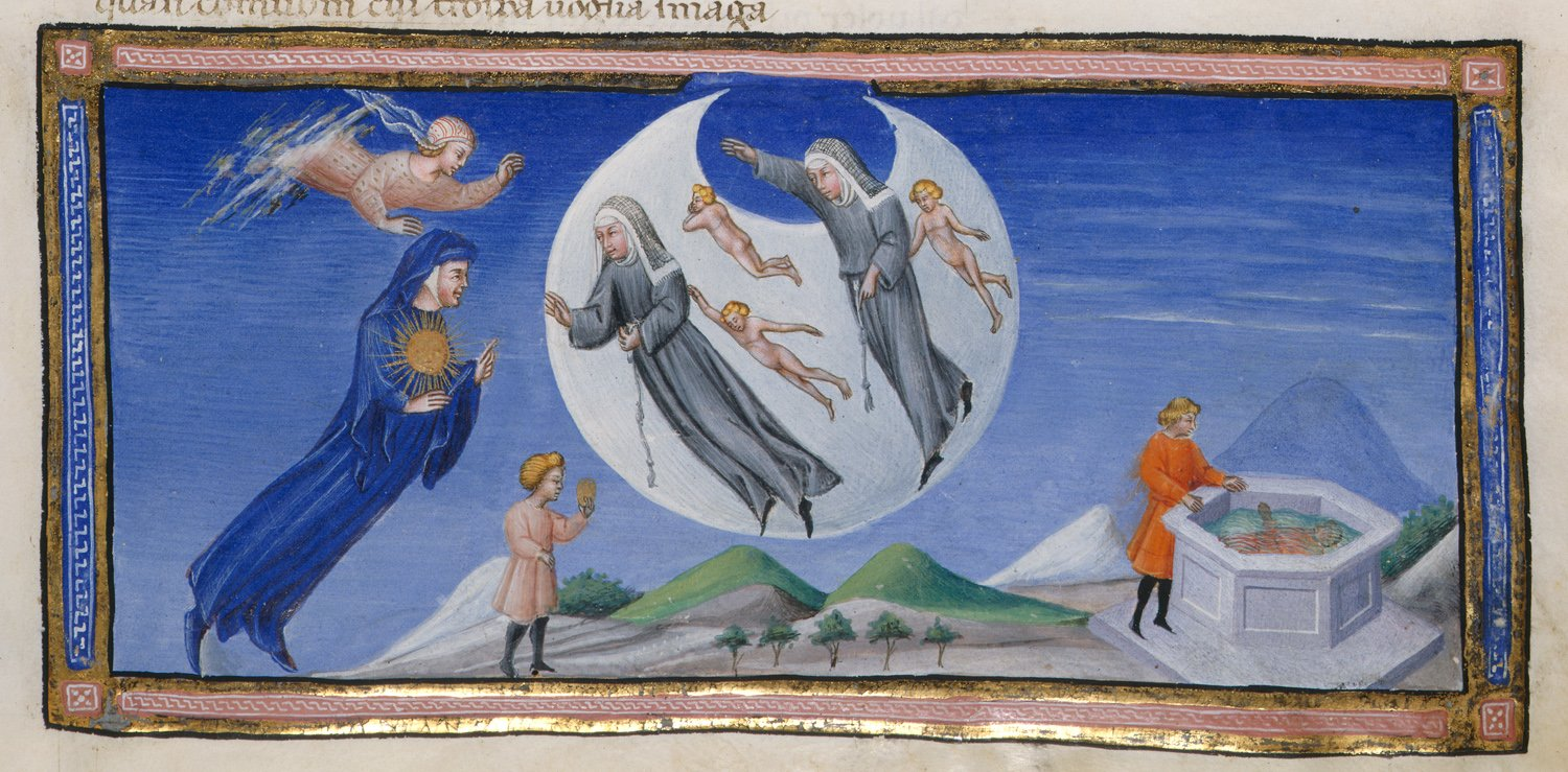 Giovanni di paolo, paradiso 05 dante.jpg